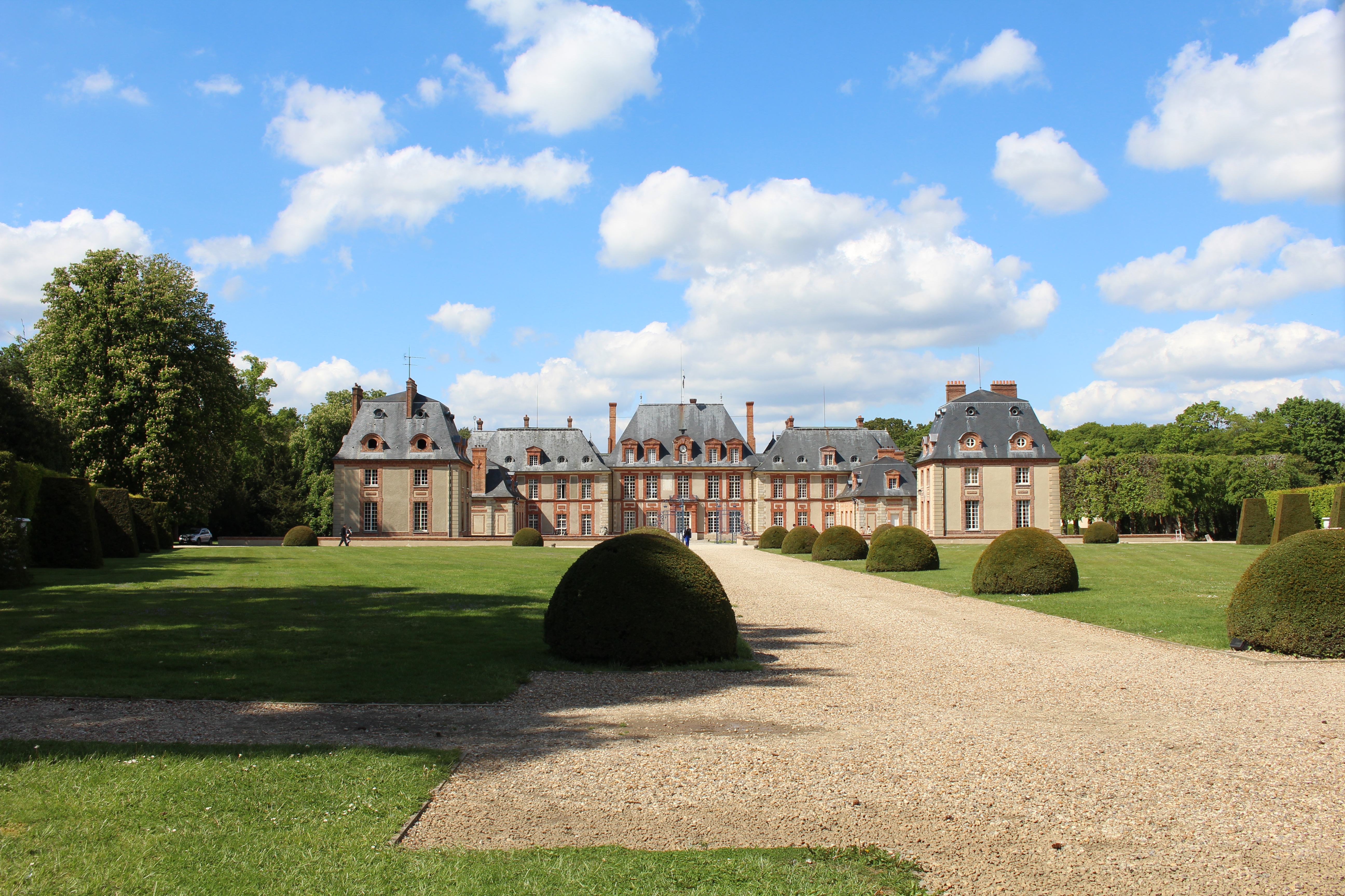 Château de Breteuil, Choisiel.